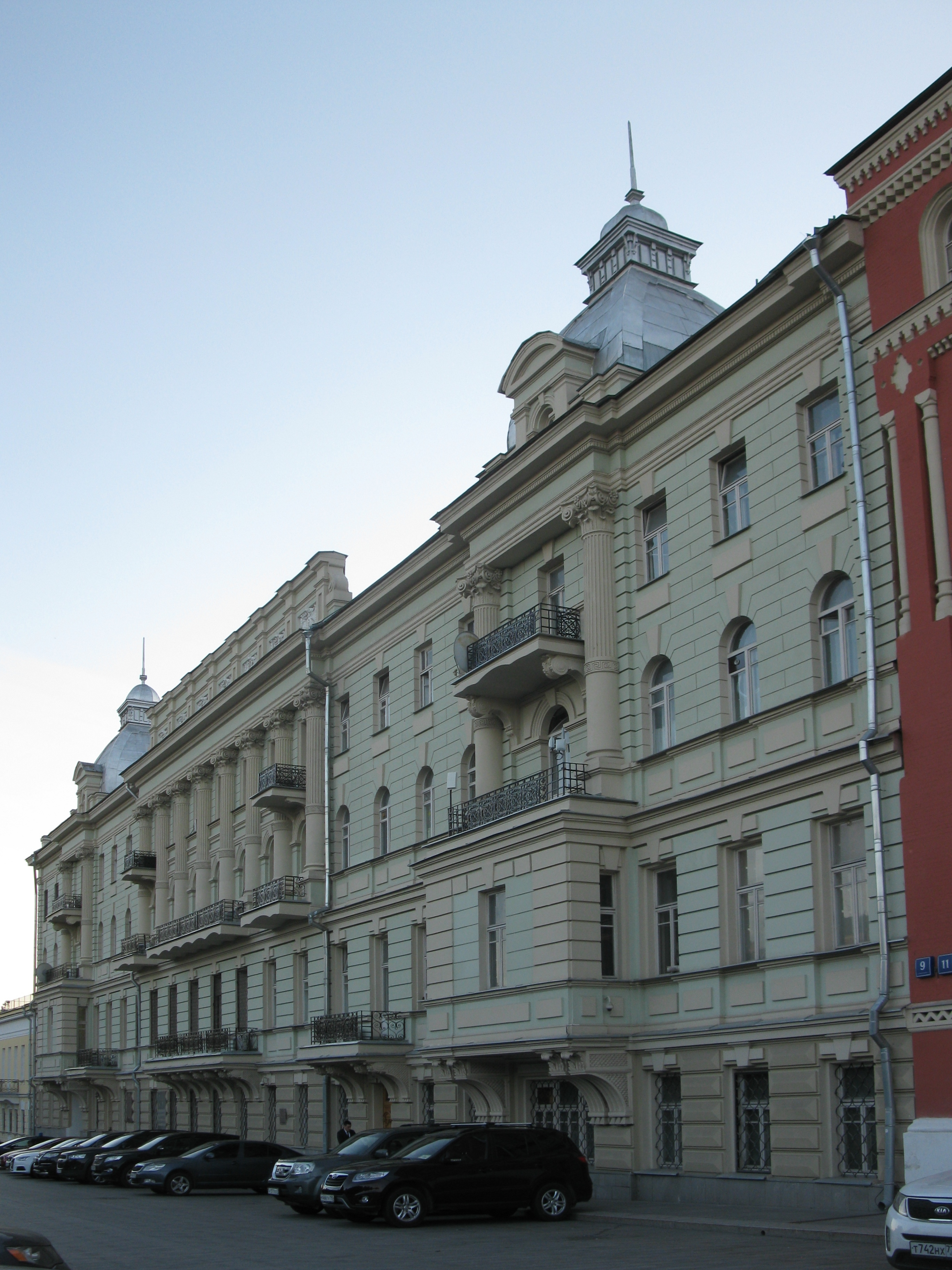 Дом доходный.: Манежная ул., дом 9, строение 1, Тверской, Центральный округ, Москва